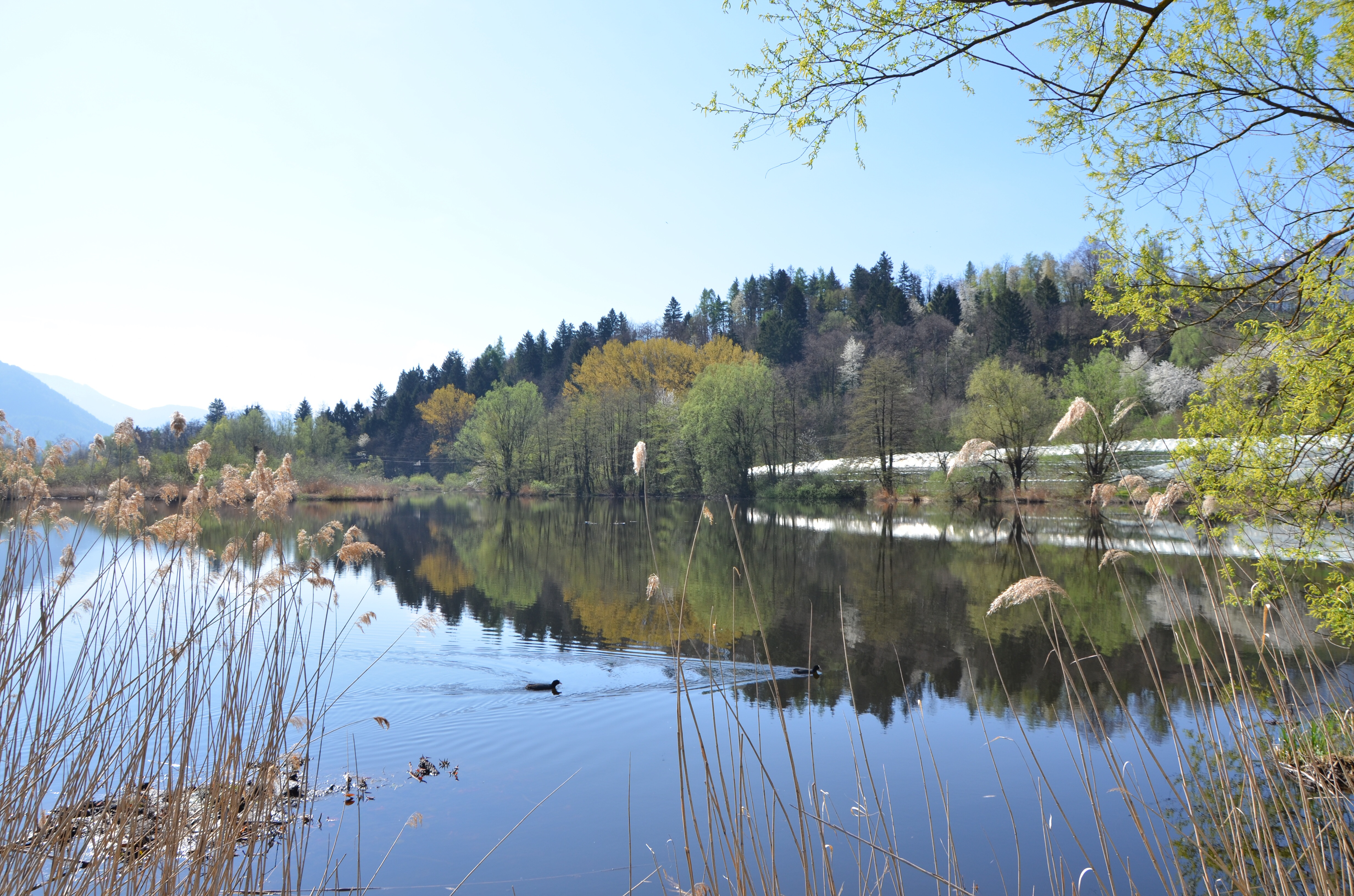 Biotopo Lago Pudro (Q3640218)